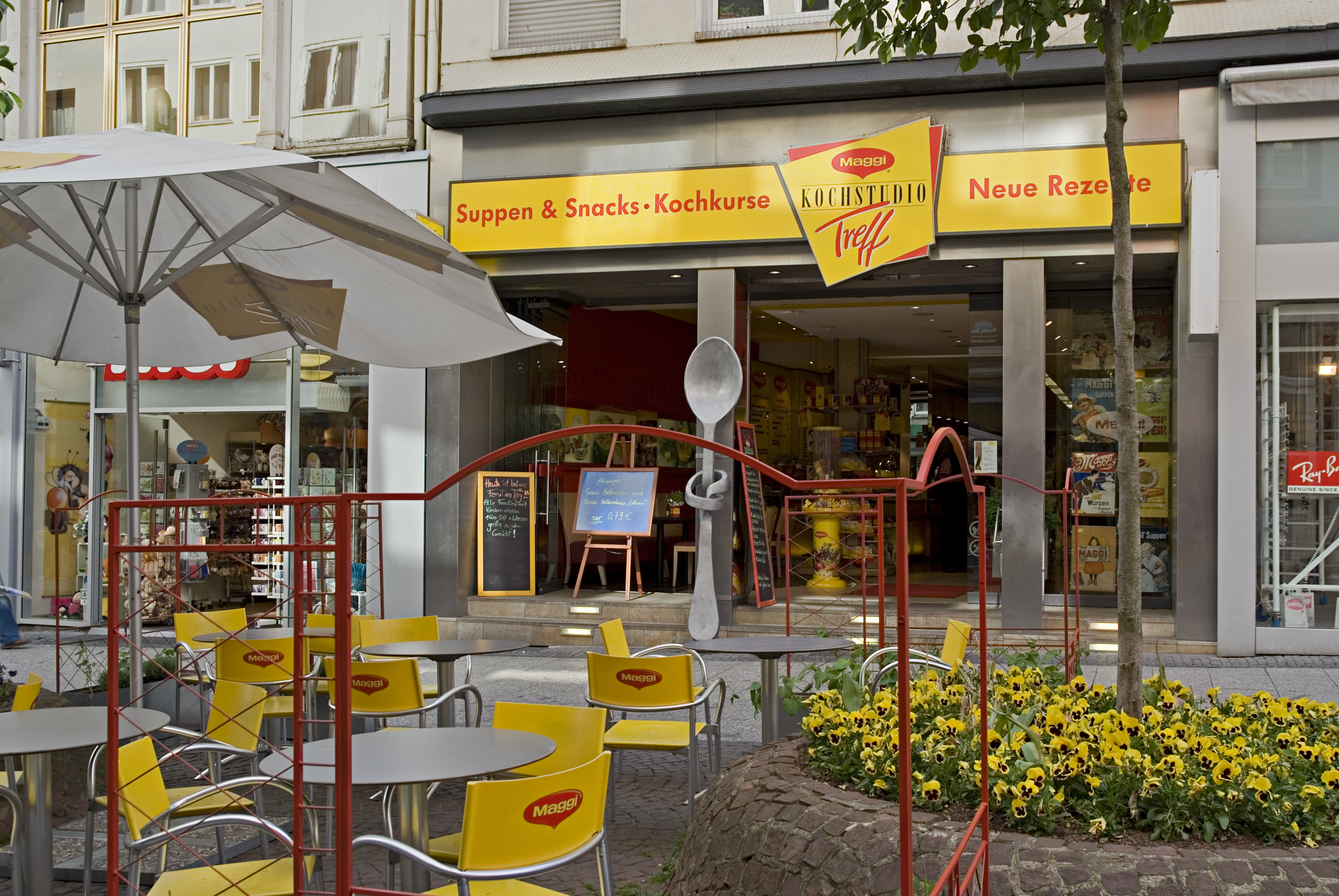 Maggi-Kochstudio, Frankfurt, Neue Kräme